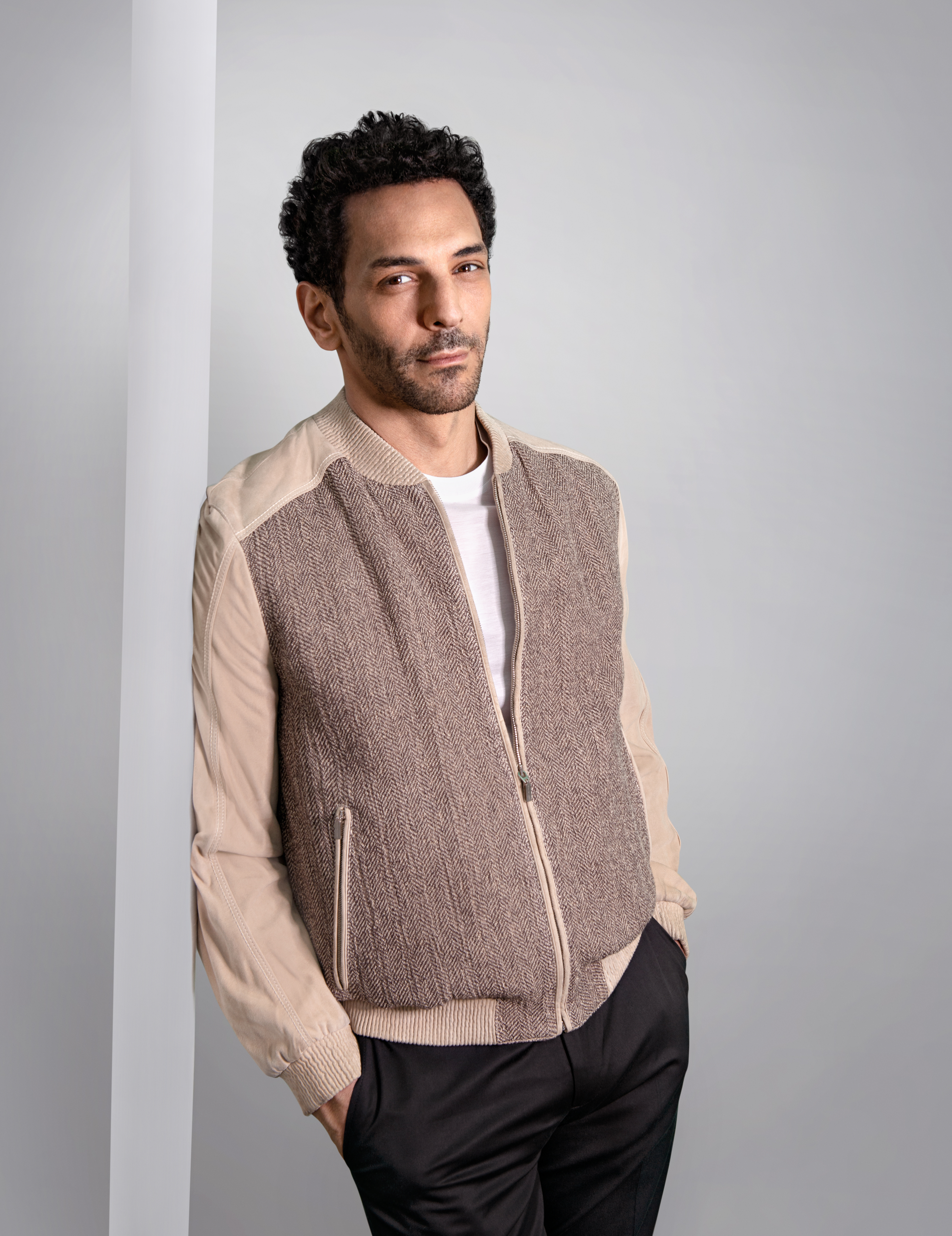 Tomer Sisley lors du Festival du film à Cannes 2019 posant dans la suite Sandra and Co pour un shooting organisé par Gil Zetbase